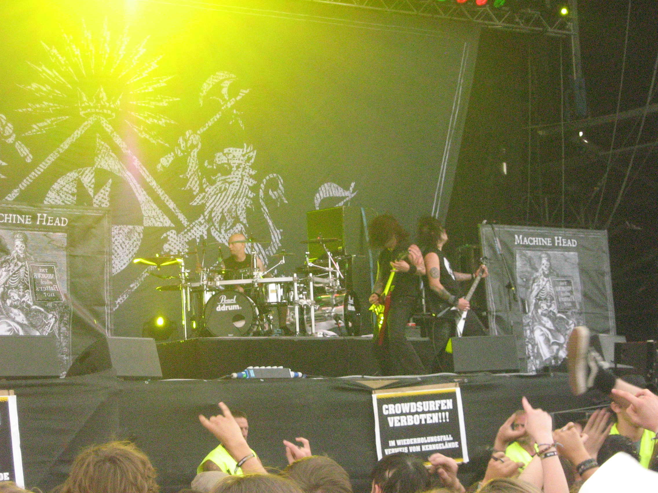 Machine head @ novarock